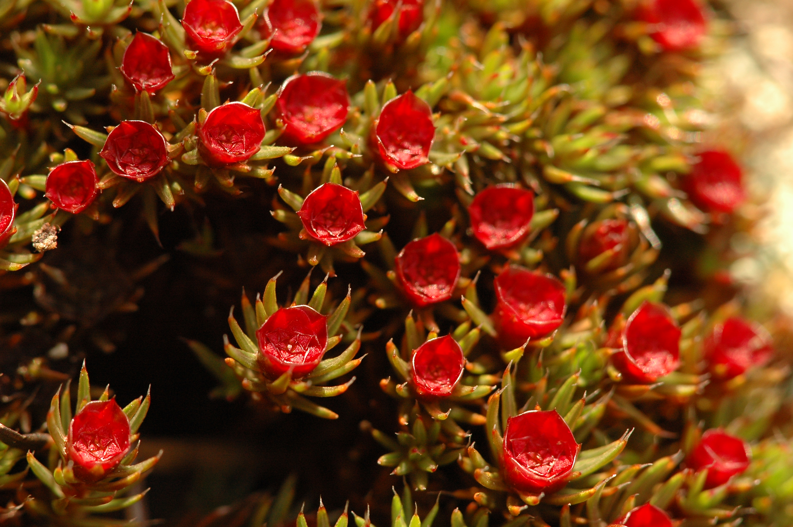 Photograph by Topi Pigula